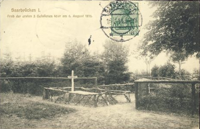 Historische Postkarte mit Foto des Grabes der ersten drei getöteten 40er Füsiliere bei der Schlacht um die Spicherer Höhen